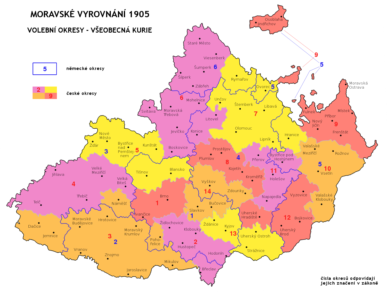 České a německé volební okresy ve všeobecné kurii podle moravského zemského zákona z 27.11.1905